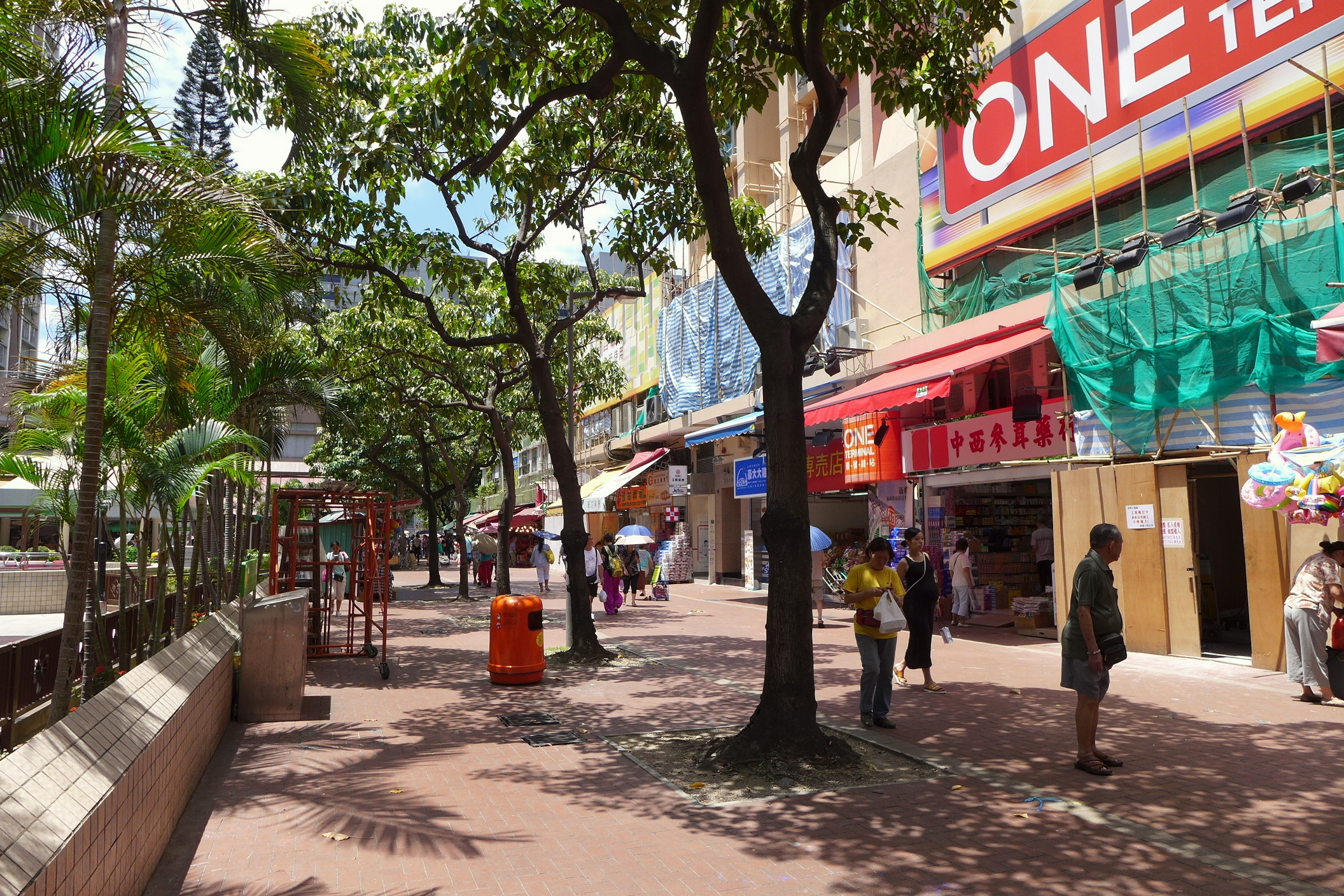 Tsing Shan Square